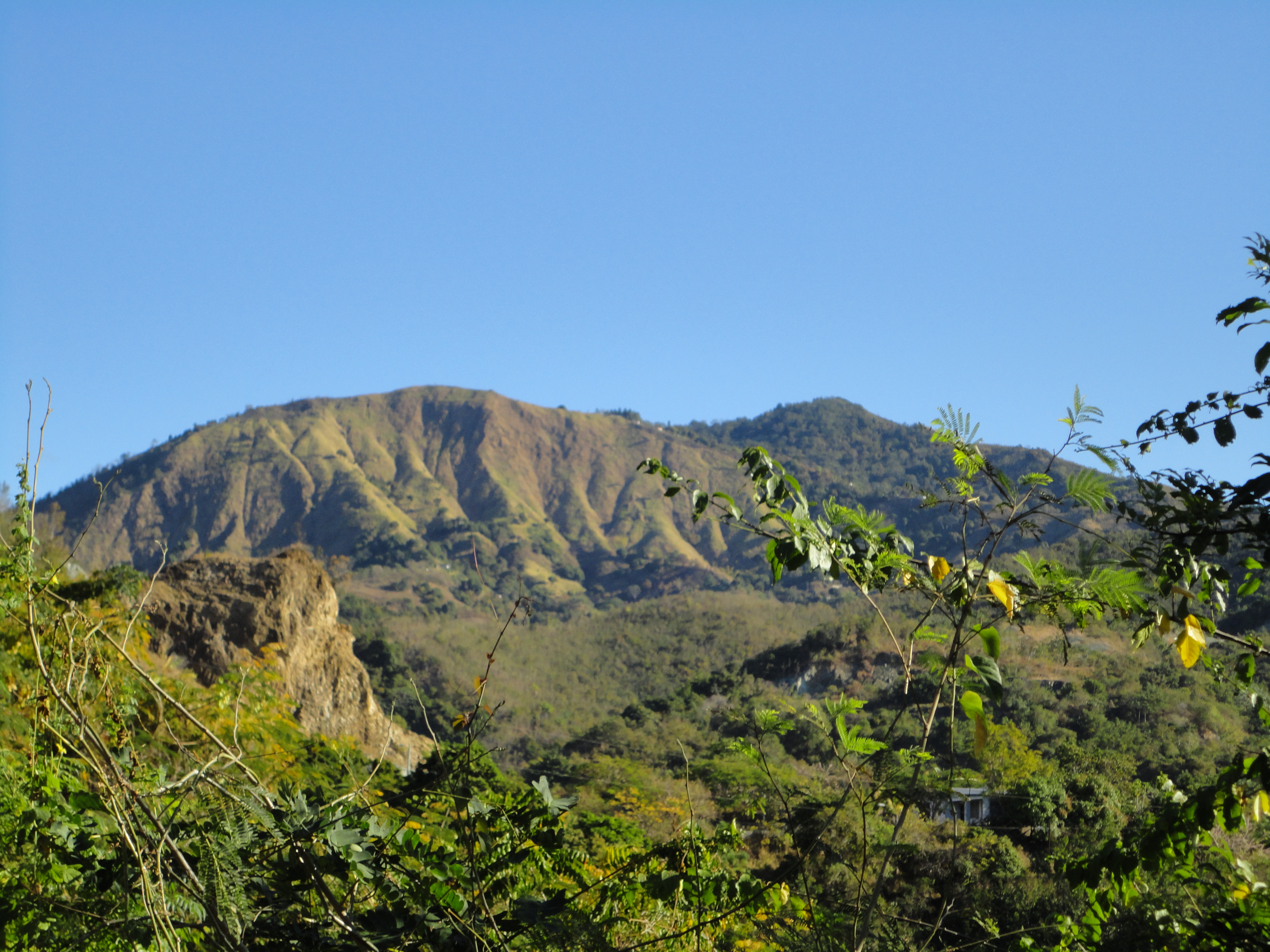 Tabonuco, Sabana Grande 00637, Puerto Rico